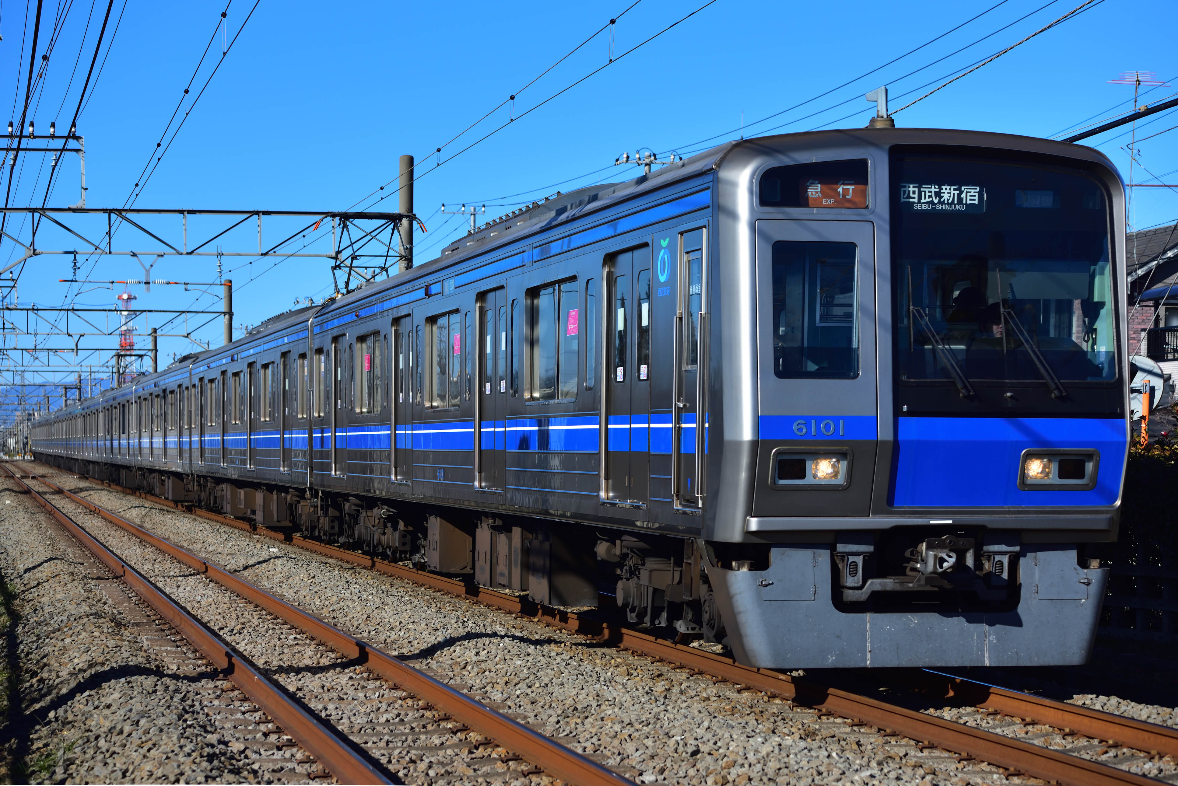 西武6000系。拝島線 小川～東大和市間。 Nikon D750